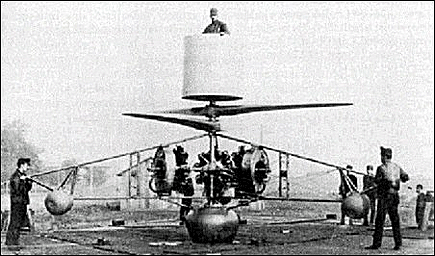 PKZ-2 helicopter